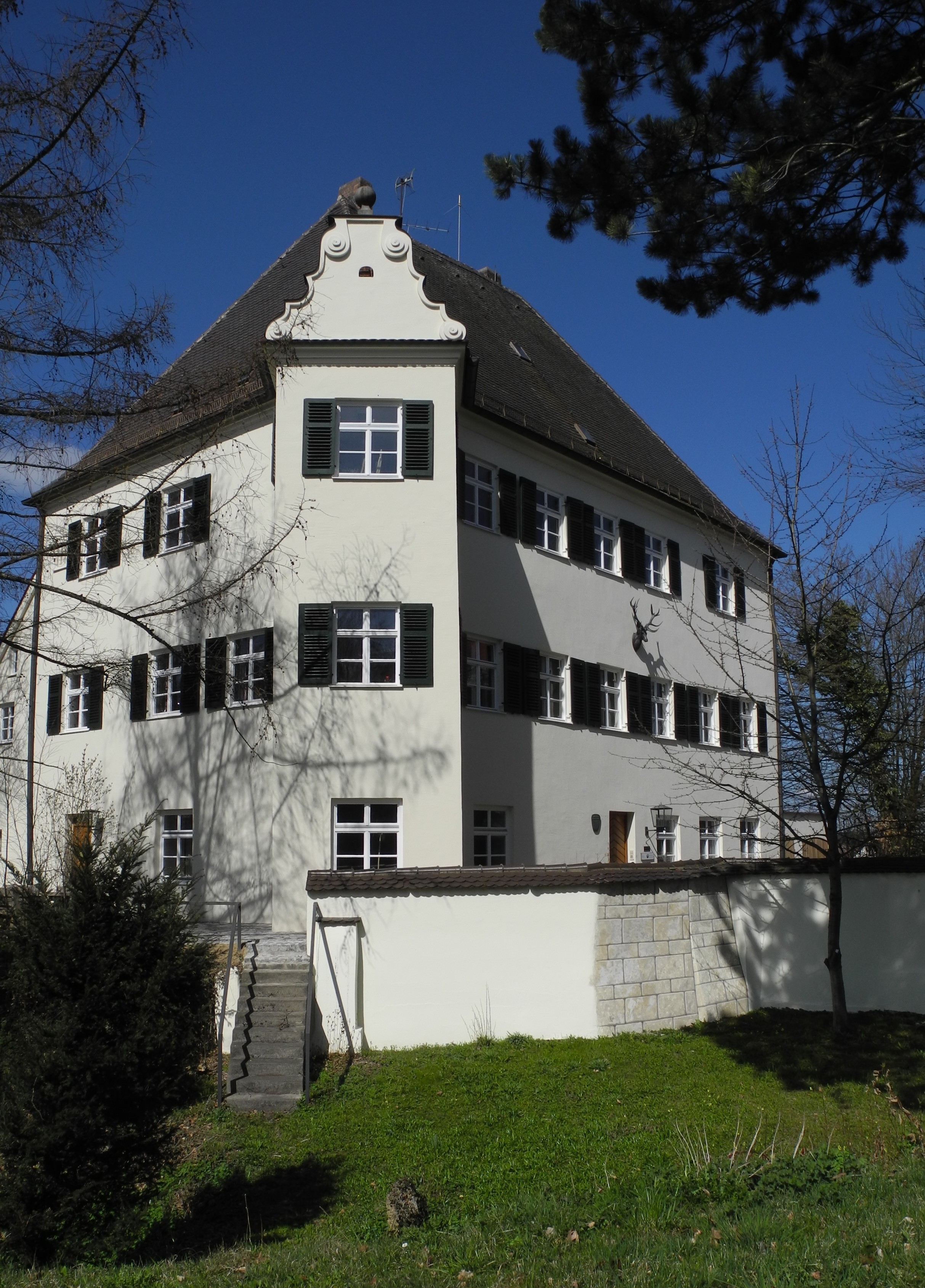 Zusmarshausen-Stiftschloss 1505, bis 2005 Staatl.Forstamt02